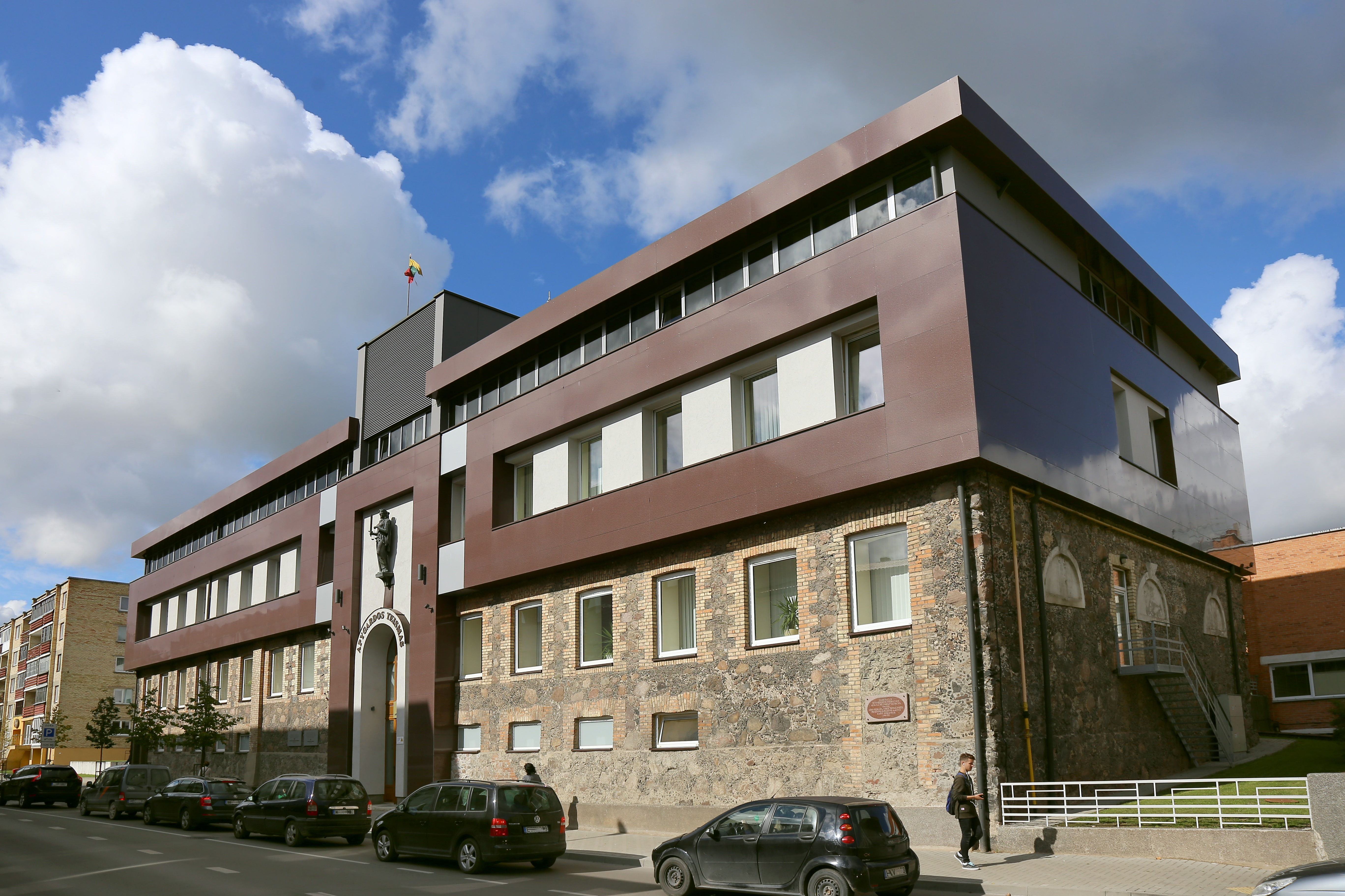 Šiaulių apygardos teismo pastatas (Dvaro g. 83)